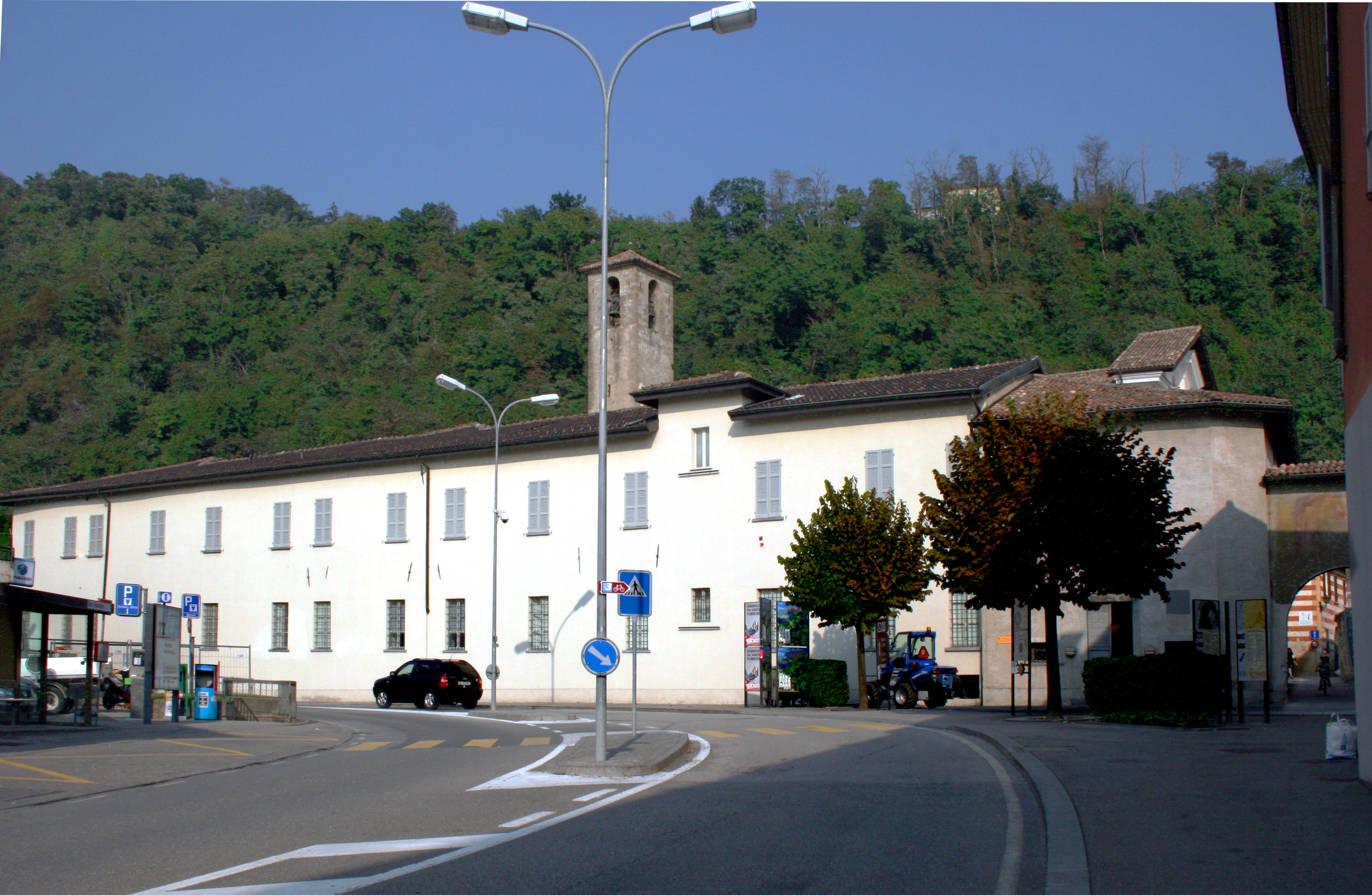 Mendrisio: facciata del Museo d'arte, con la facciata dell'oratorio della Madonna delle grazie e l'antica porta del borgo.